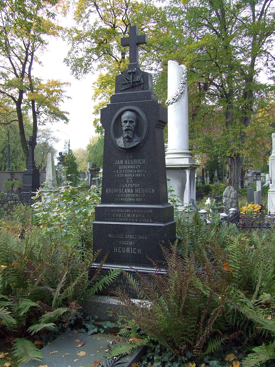 Jan Heurich tomb (1834-1887), Cmentarz Ewangelicko-Augsburski w Warszawie